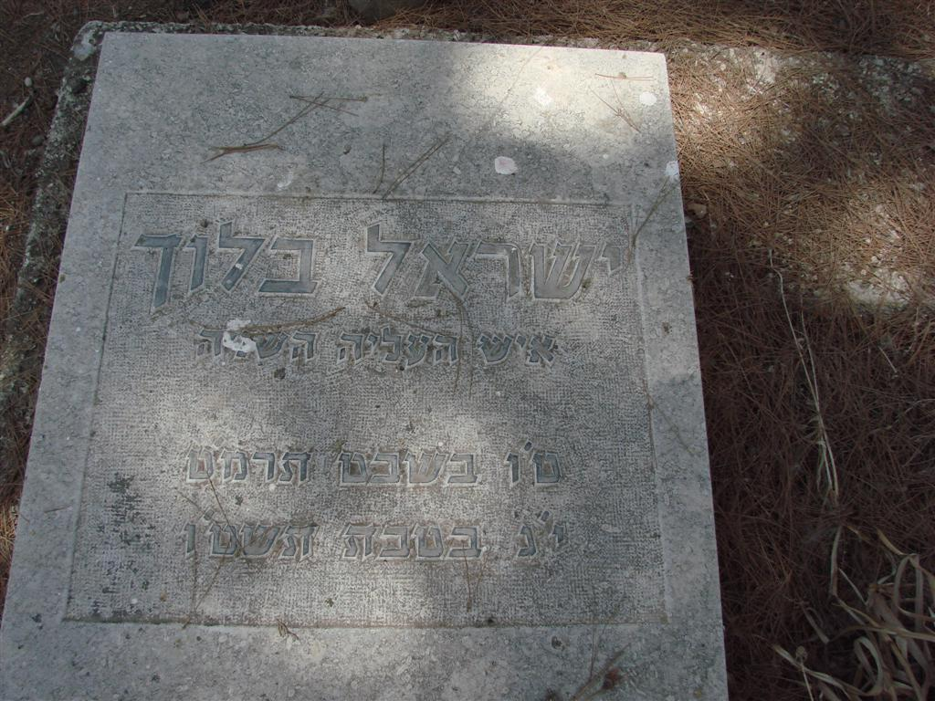 ישראל בלוך